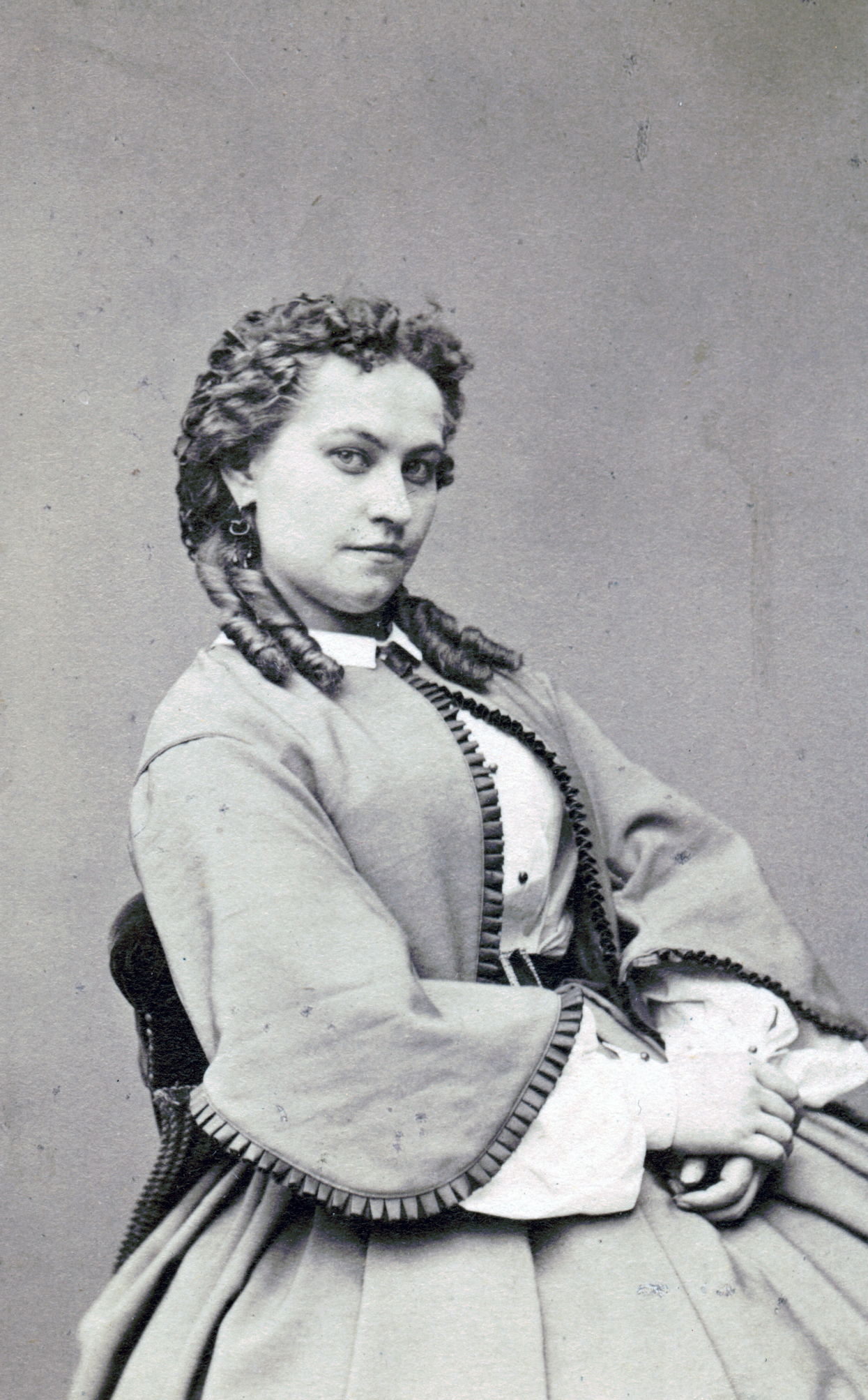 Hedvig Charlotta Forsman, skådespelare vid Mindre teatern 1862